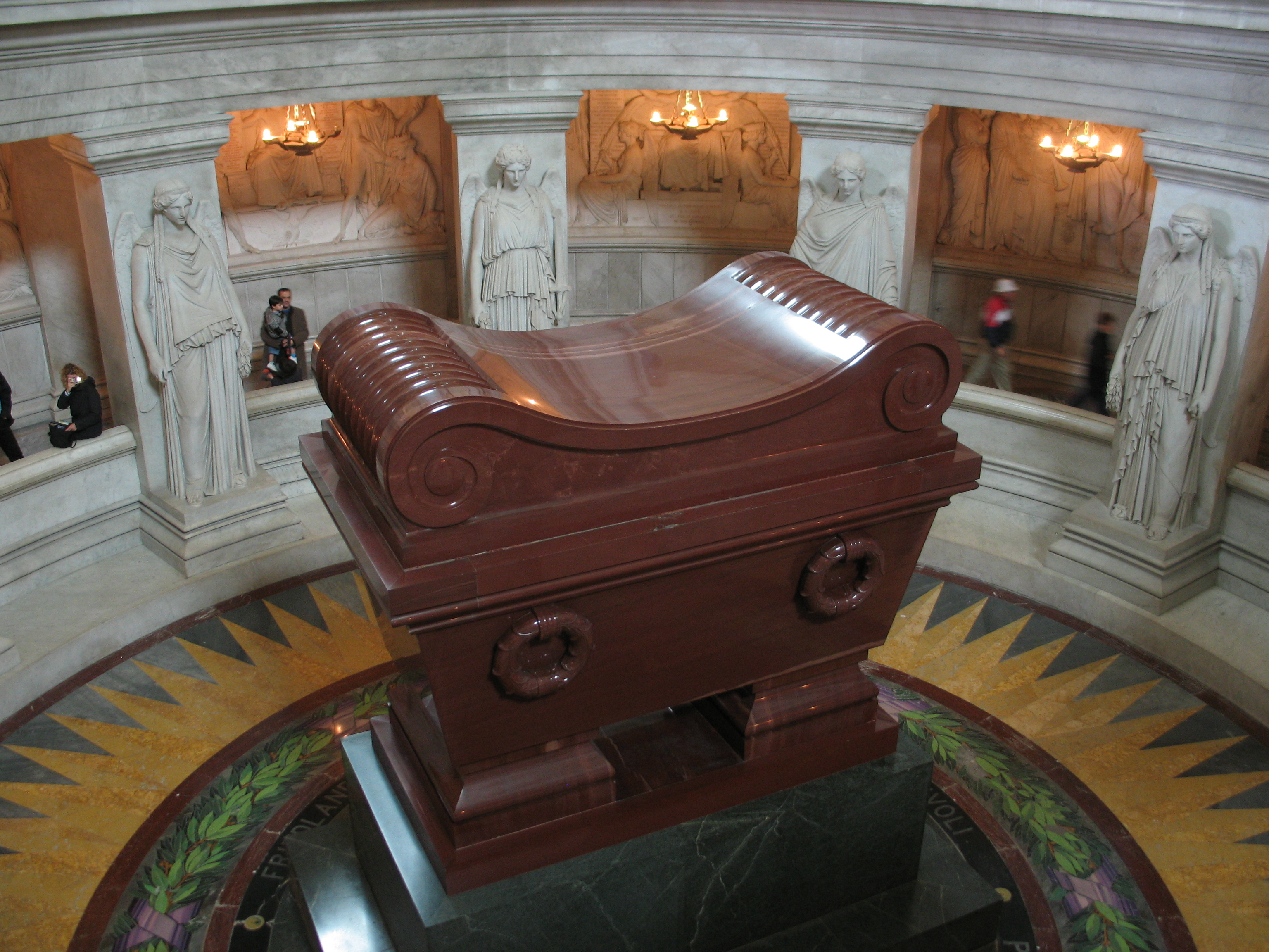 Der Sarkophag Napoléons im Invalidendom